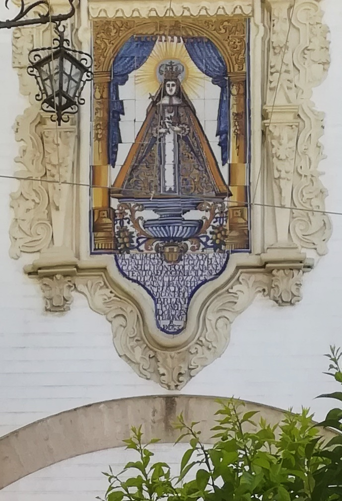 Virgen de las Nieves. Hacienda de Montefuerte. Tomares, provincia de Sevilla, Andalucía, España.